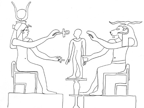 Der widderköpfige Schöpfergott Chnum formt das göttliche Kind Ihy (Horus/König) auf der Töpferscheibe und die Göttin Isis verleiht ihm Leben, indem sie ihm die Hierogylyphen für Leben (Anch) entgegenstreckt. Aus dem Mammisi des Trajan in Dendera.